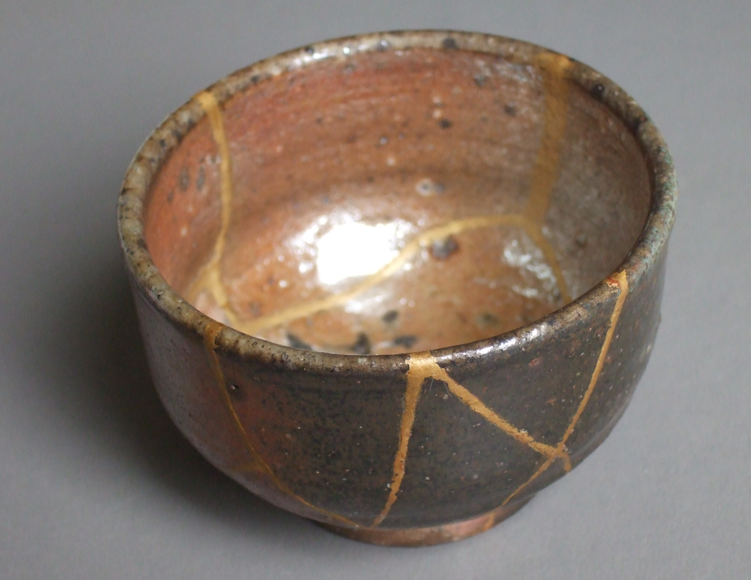 肥田菁圃氏作のぐい呑を、投稿者自身により金継ぎした習作。 （金粉のつけ方が上手くない部分あり）